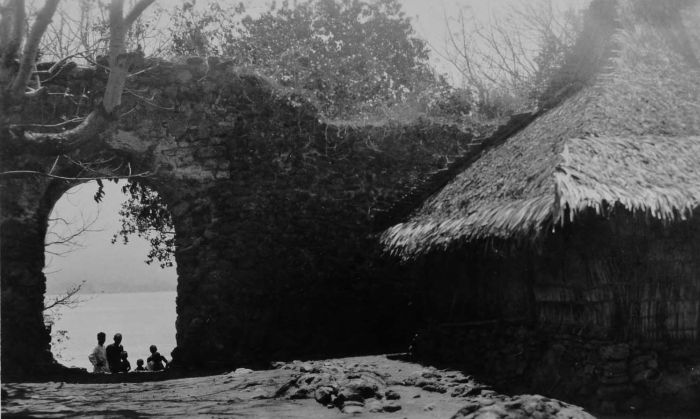 Foto. Gezicht uit het fort van Solor op Tedoenara